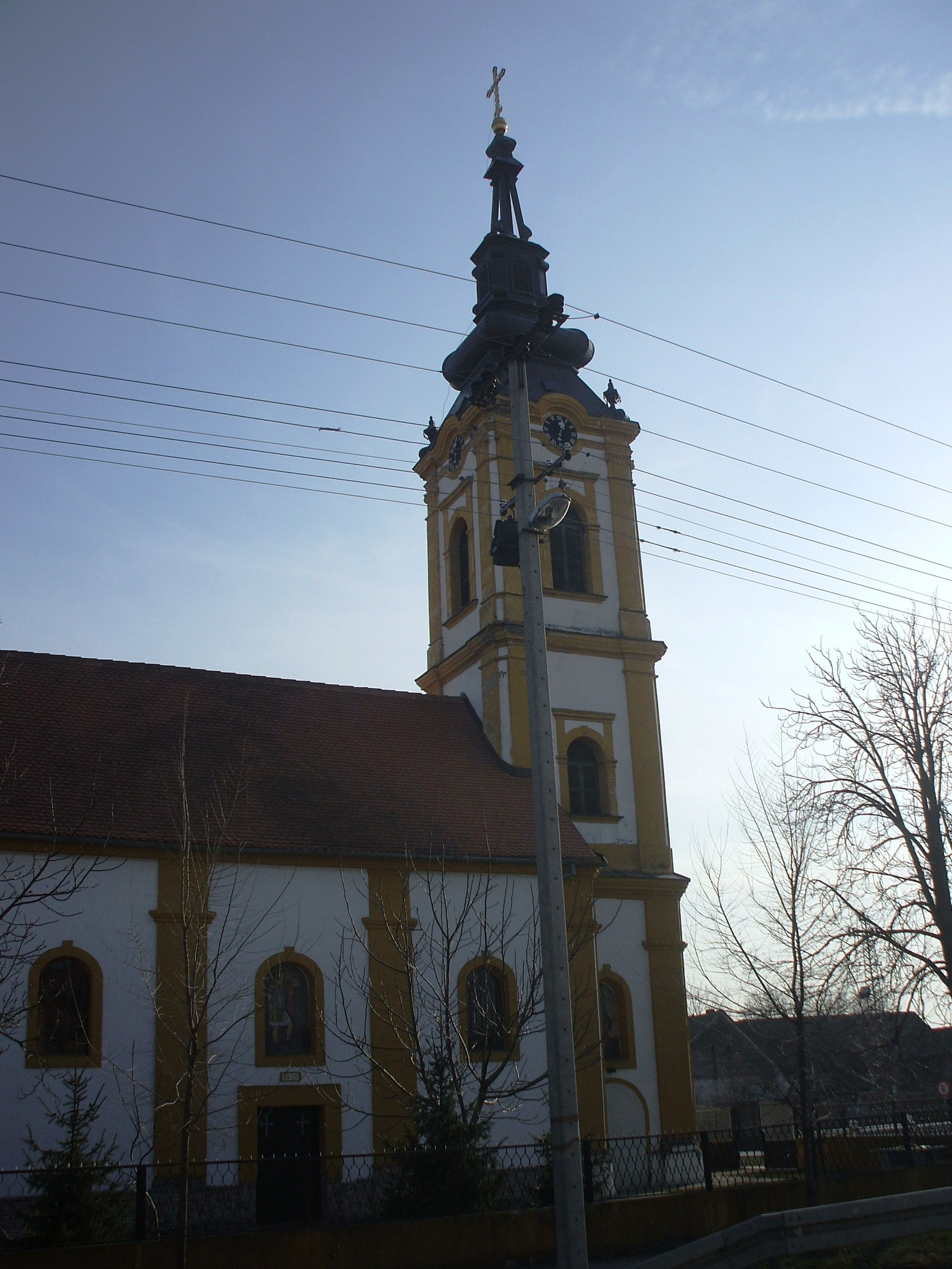 Бачинци (православна црква)